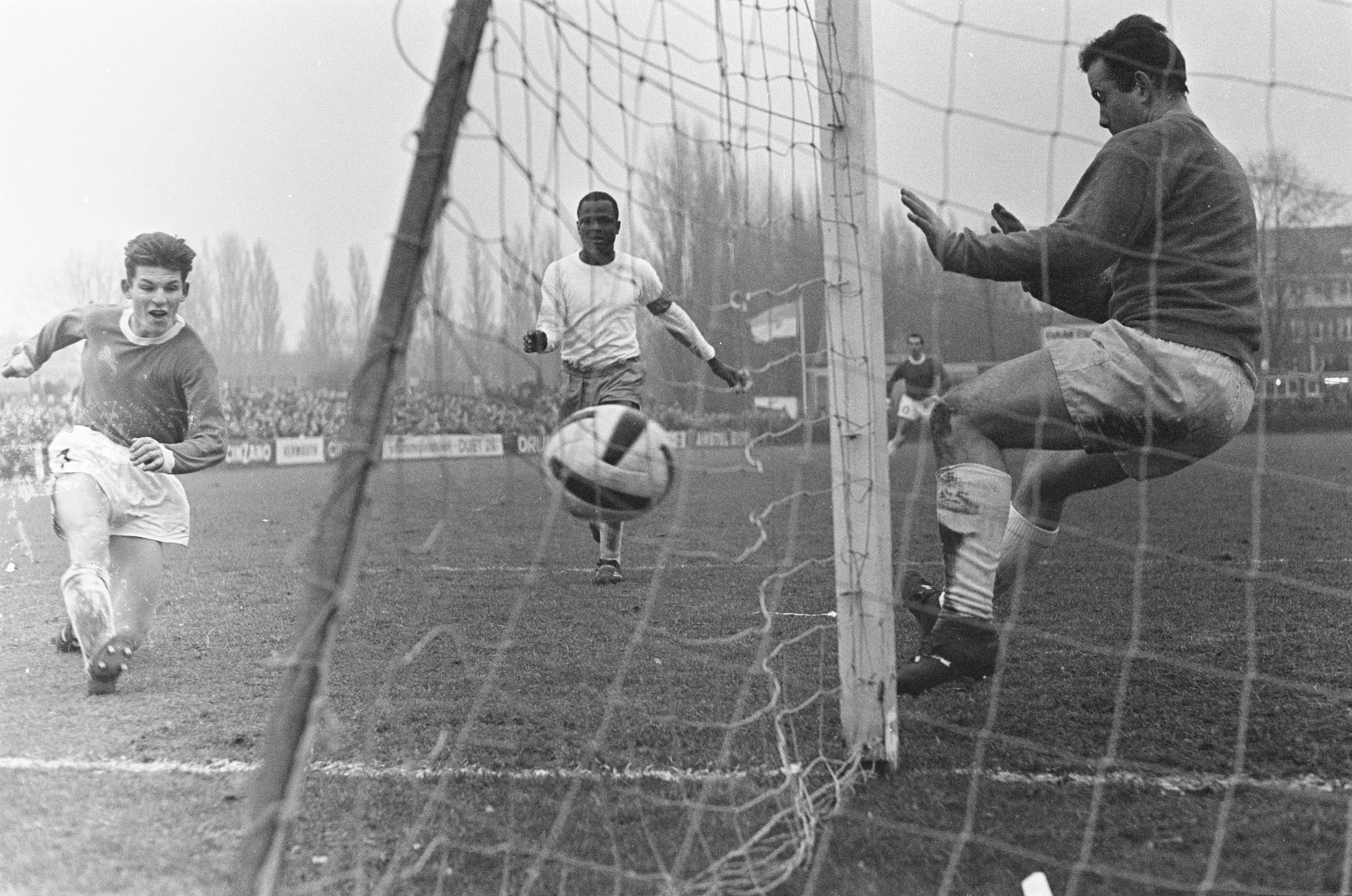 Blauw-Wit tegen Vitesse 0-0, Hofs (Vitesse) lost schot op keeper Paternotte, midden Sparendam (Blauw-Wit) Datum 4 februari 1968